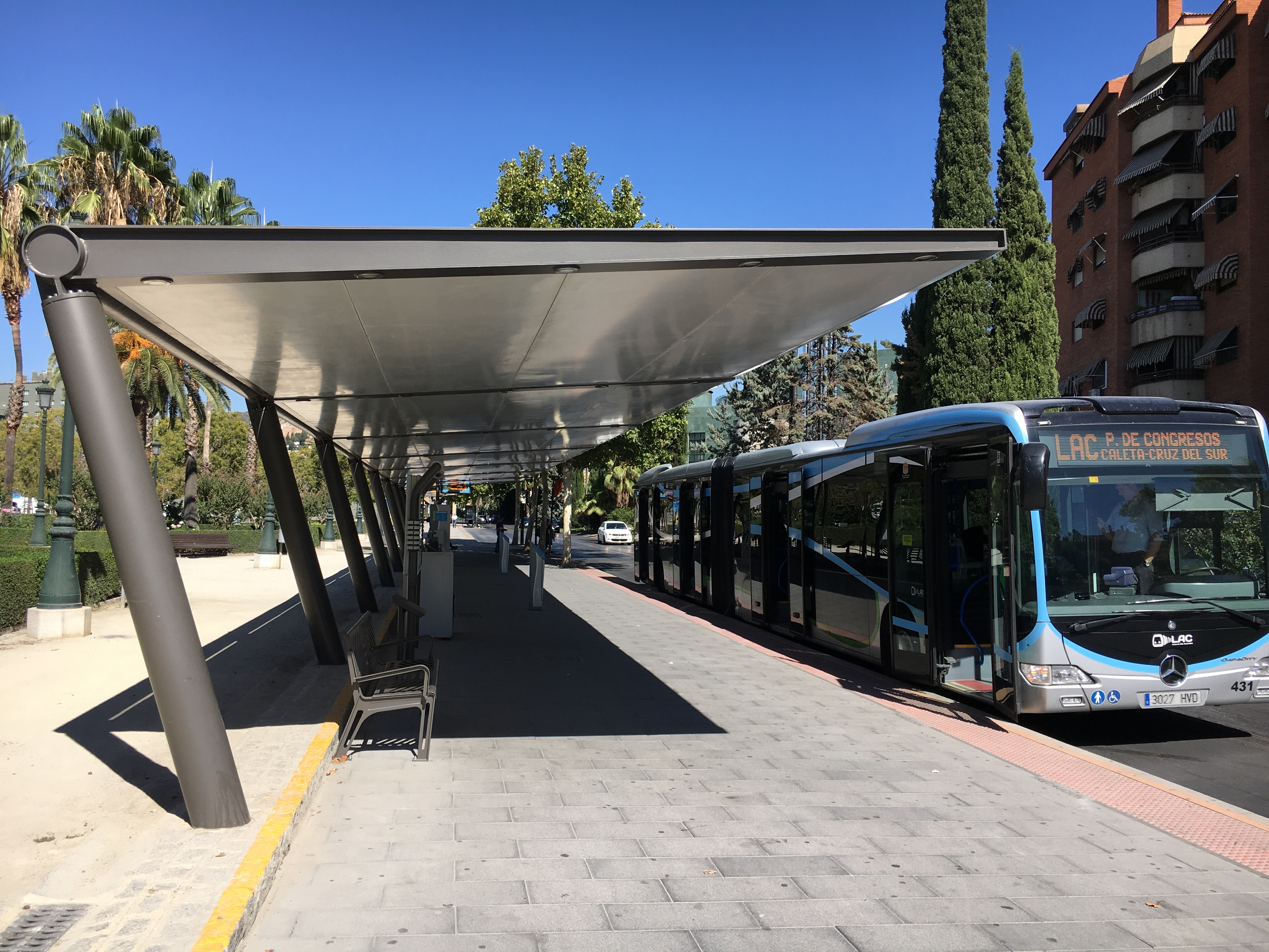 Línea de Alta Capacidad de Granada (LAC) en el intercambiador de Palacio de Congresos